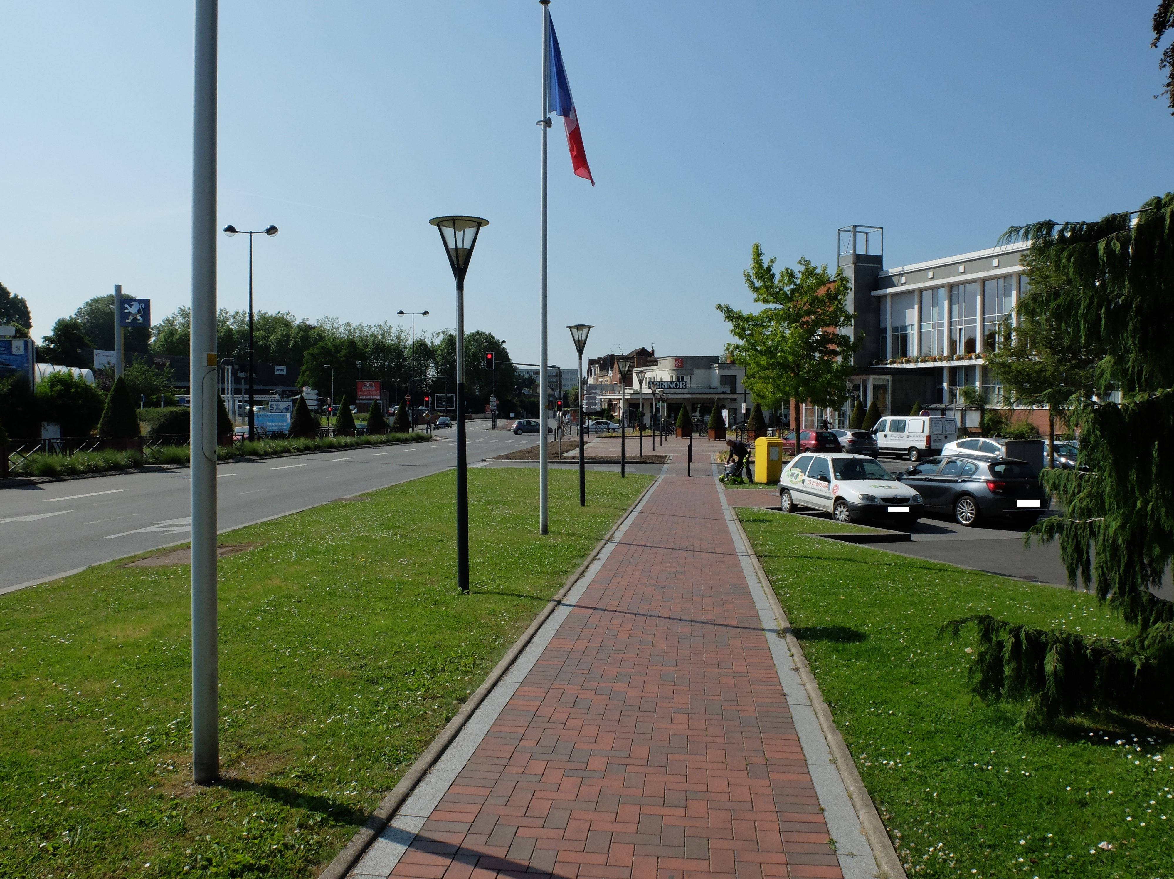 Vue de la rue Clemenceau de Wattignies.